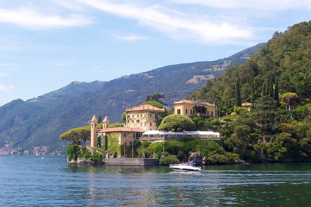 Villa Balbianello in Lenno, Lake Como, Italy